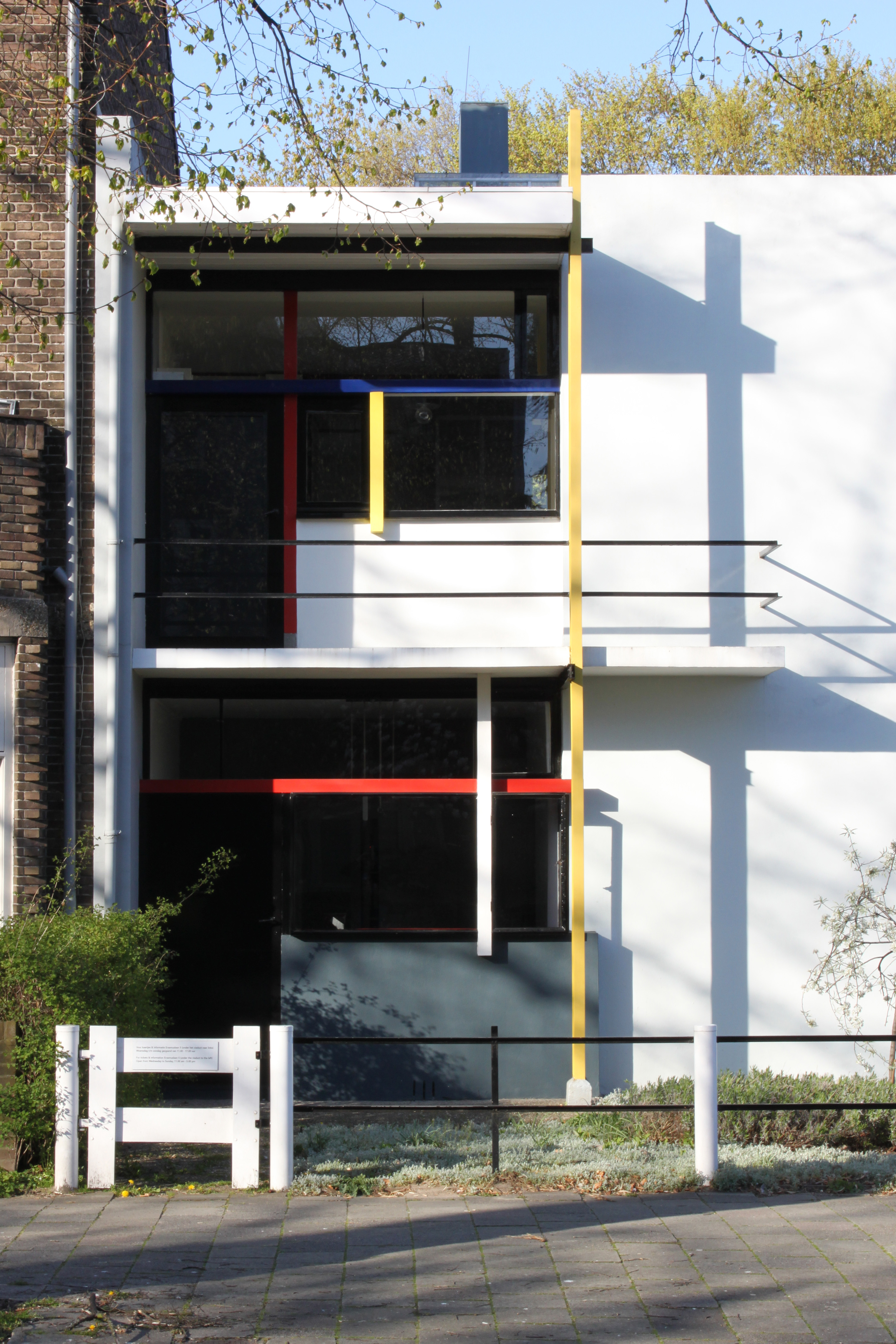 Het Rietveld-Schröderhuis in Utrecht